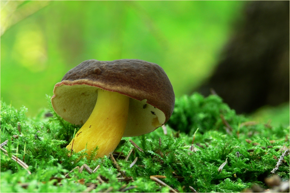 Herbst-Rotfuß (Xerocomellus pruinatus)